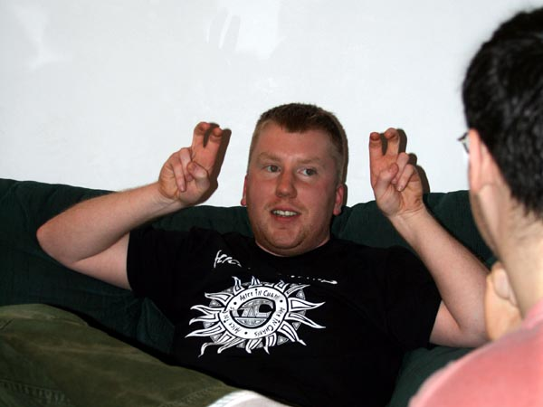 Air Quotes